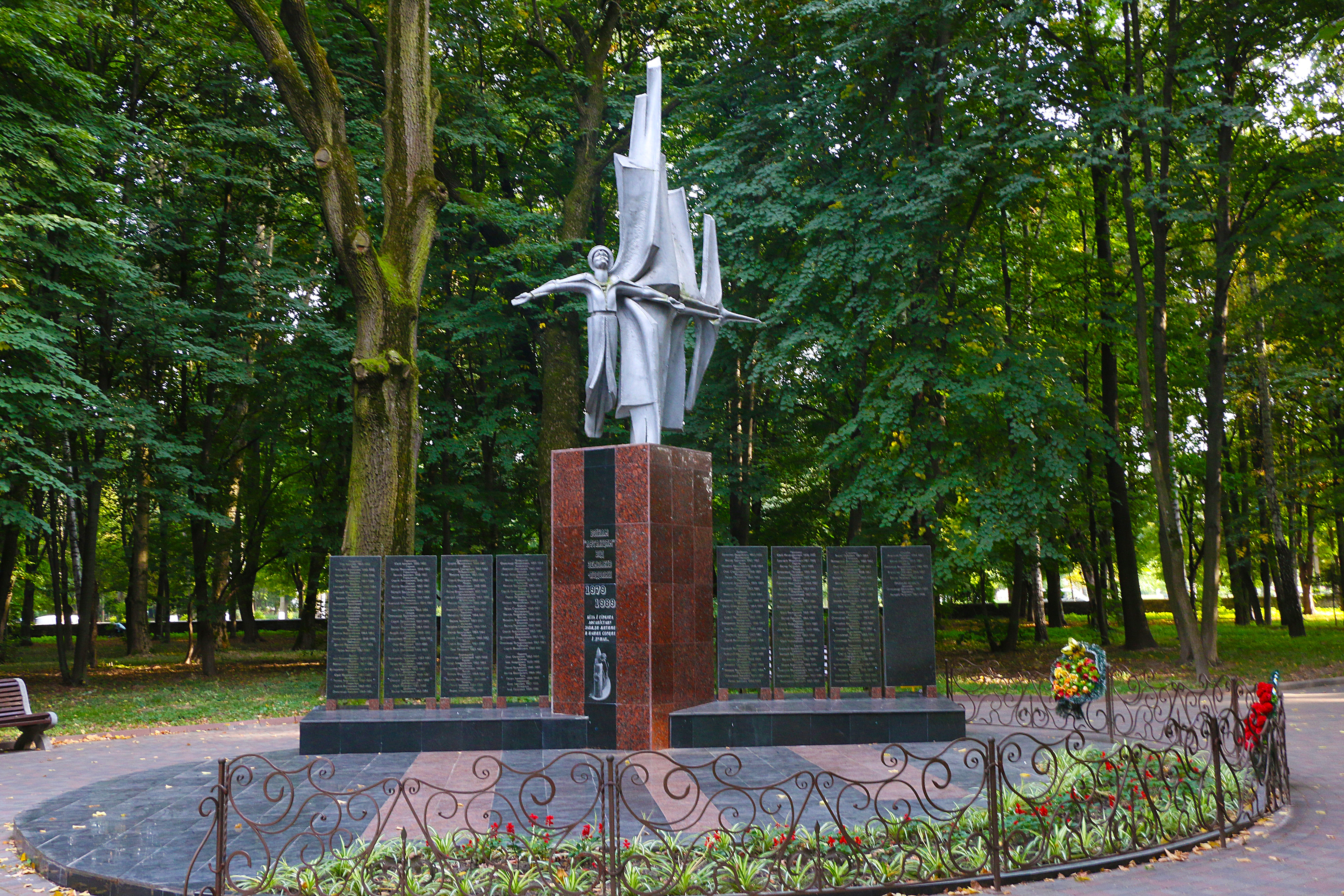 Пам'ятник воїнам, загиблим в Афганістані, Вінниця, парк культури і відпочинку